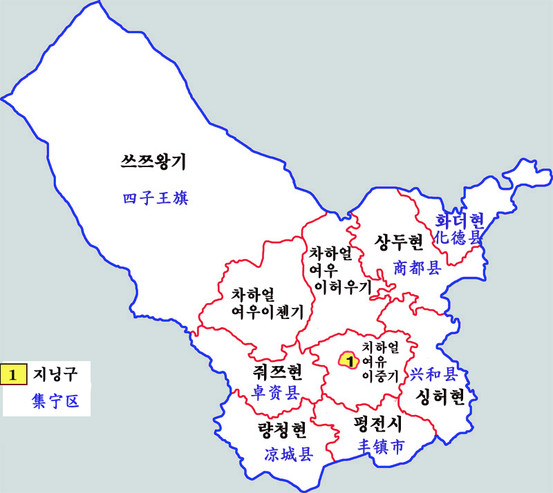 울란차브시 현급구역